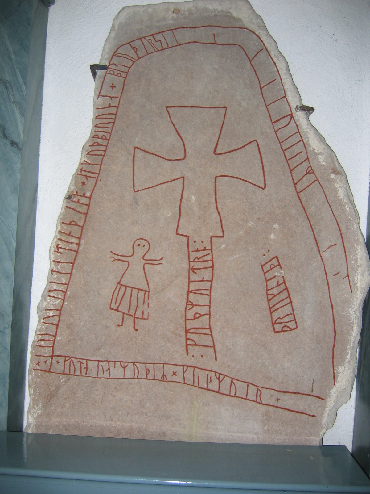 Runstenen Gs 7 i Torsåkers kyrka.